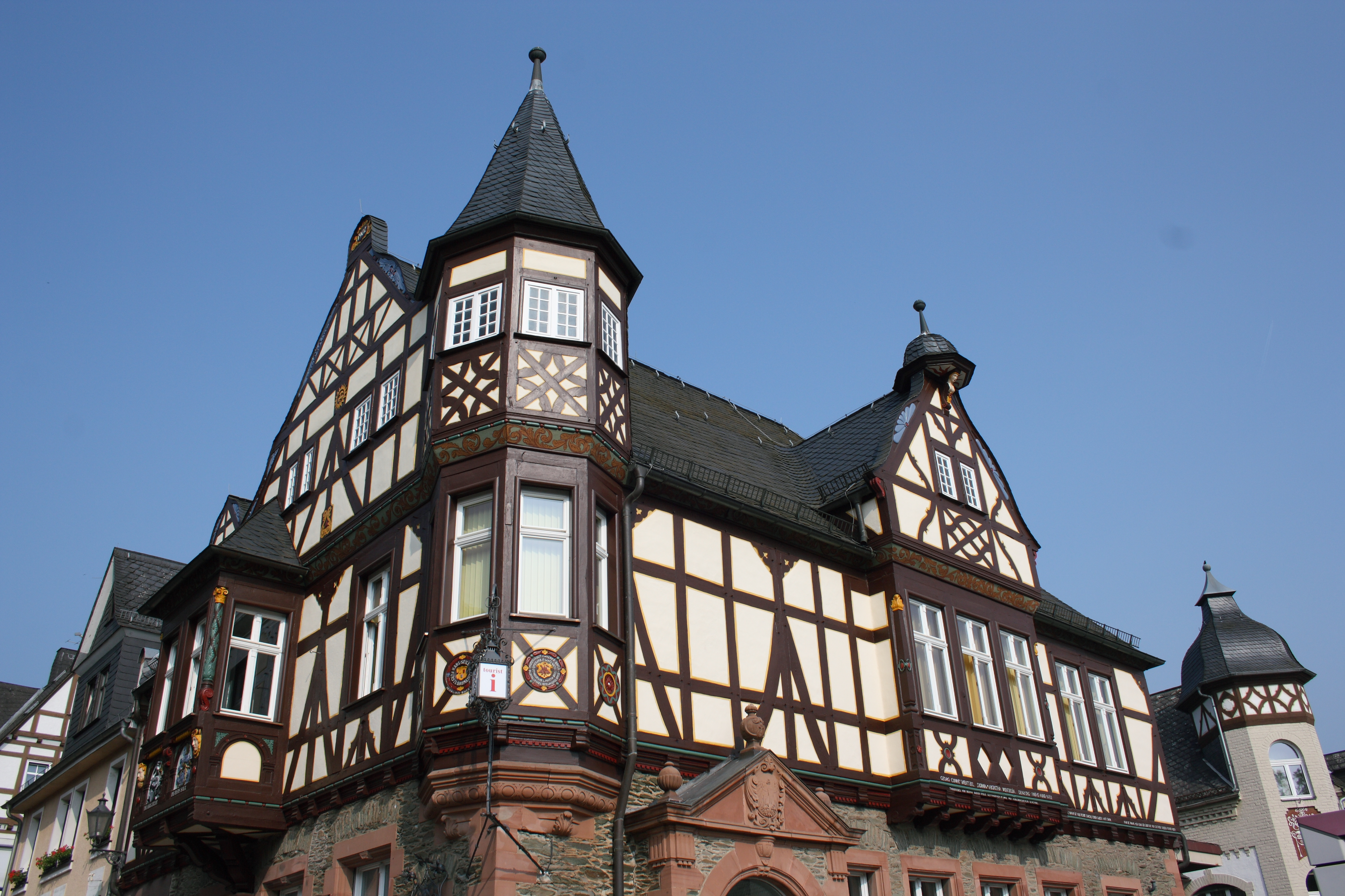 ehemaliges Postamt in Braunfels im Lahn-Dill-Kreis (Hessen), Am Kurpark 11